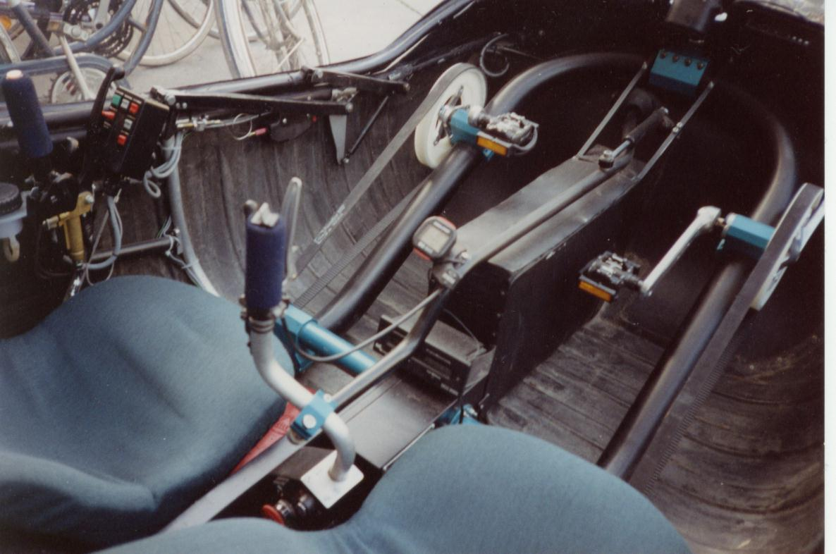 Innenaufnahme TWIKE III